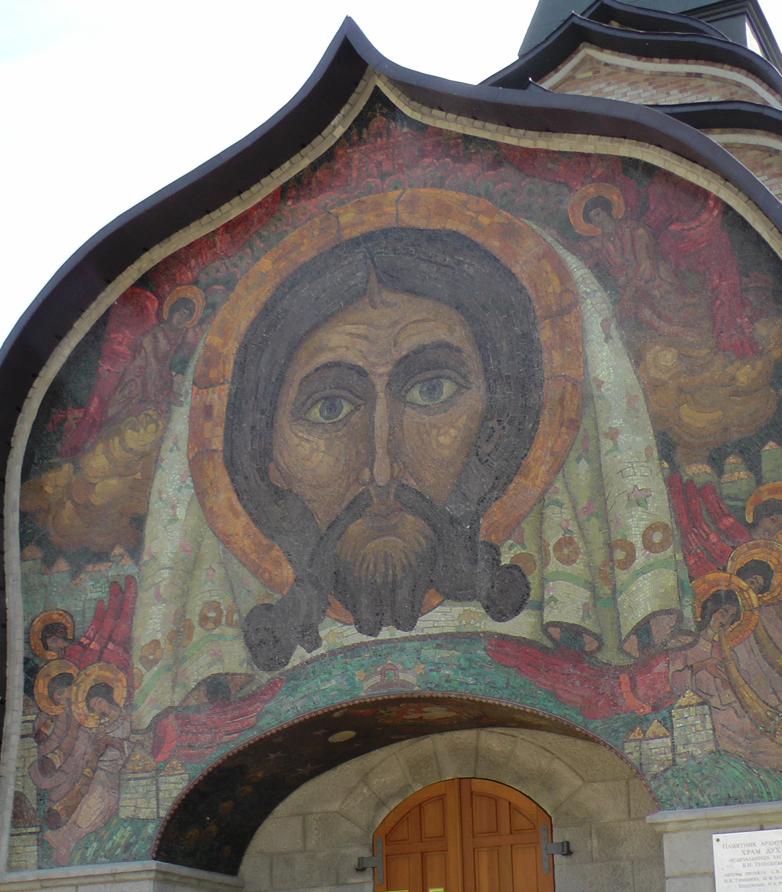 Н. Рерих. Спас Нерукотворный (Талашкино), 1910-е годы.